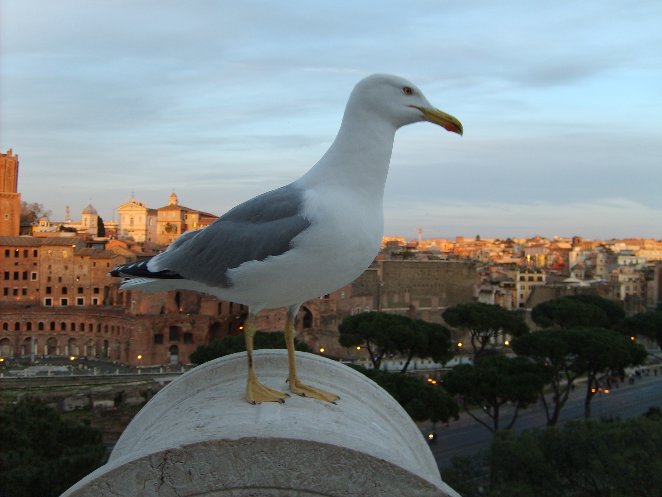 Foto di un gabbiano reale zampegialle Larus michahellis fatta al Vittoriano.